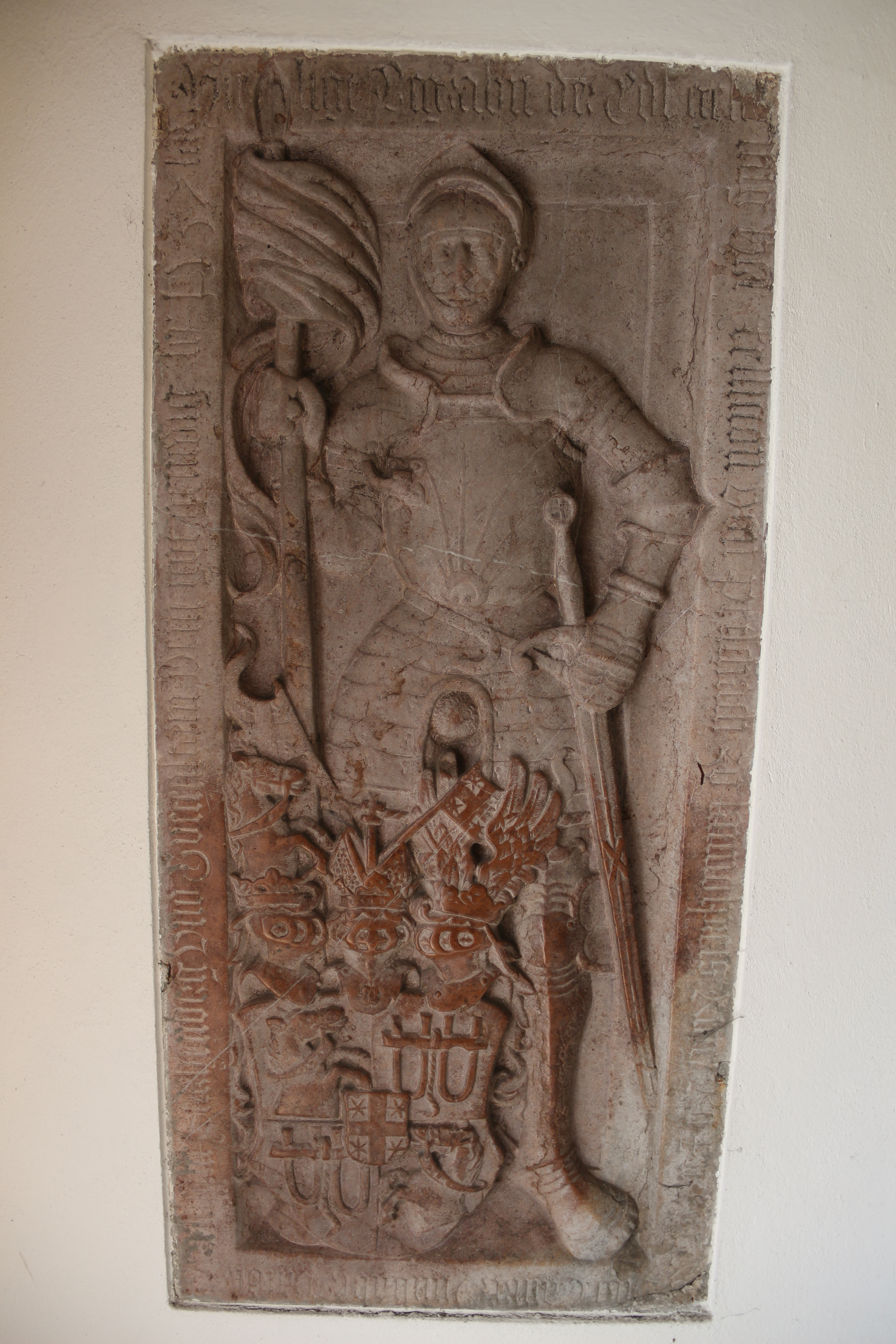 Kath. Pfarrkirche hl. Johannes der Täufer in Gutenstein, Niederösterreich.